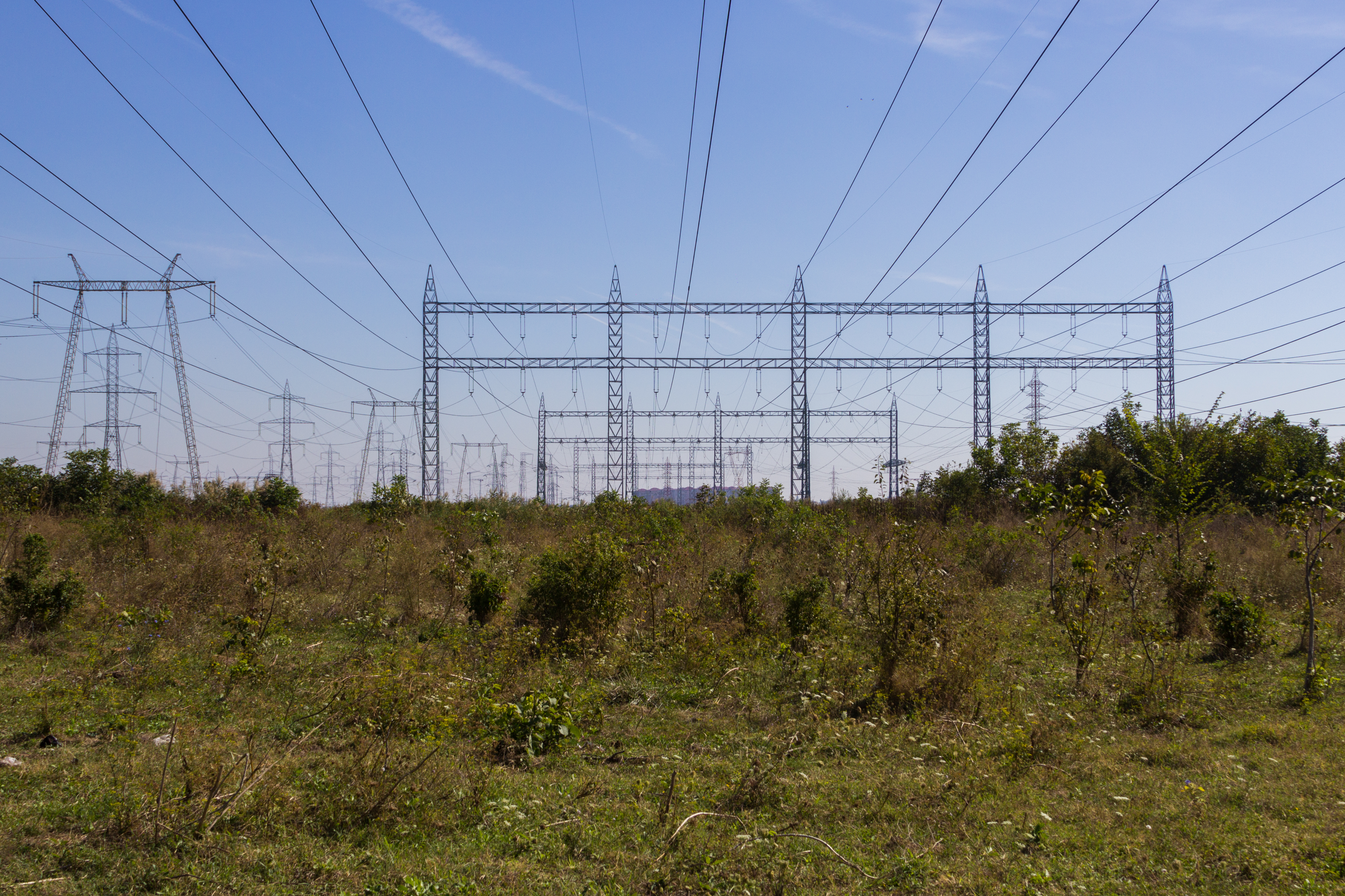 CET Dudești - vedere spre Est din Strada Malul Mierii. 02